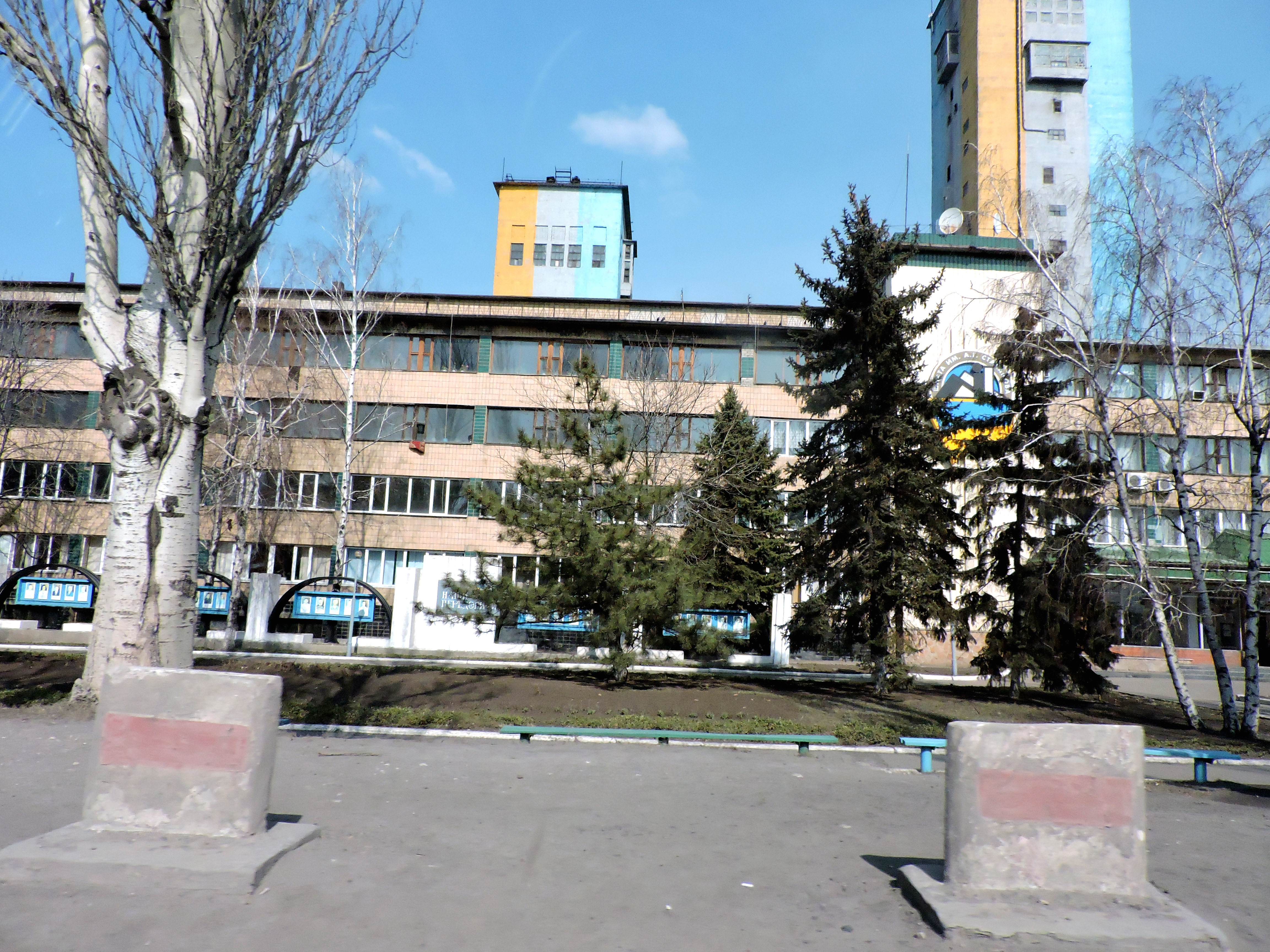 Шахта імені О.Г. Стаханова у м. Мирноград. Головна адміністративна будівля.